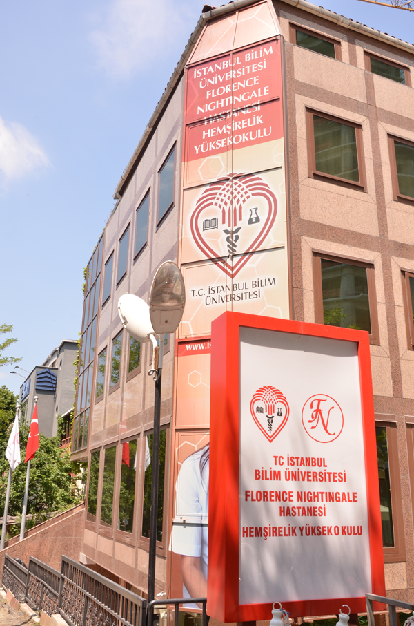 T.C. İstanbul Bilim Üniversitesi Florence Nightingale Hastanesi Hemşirelik Yüksekokulu